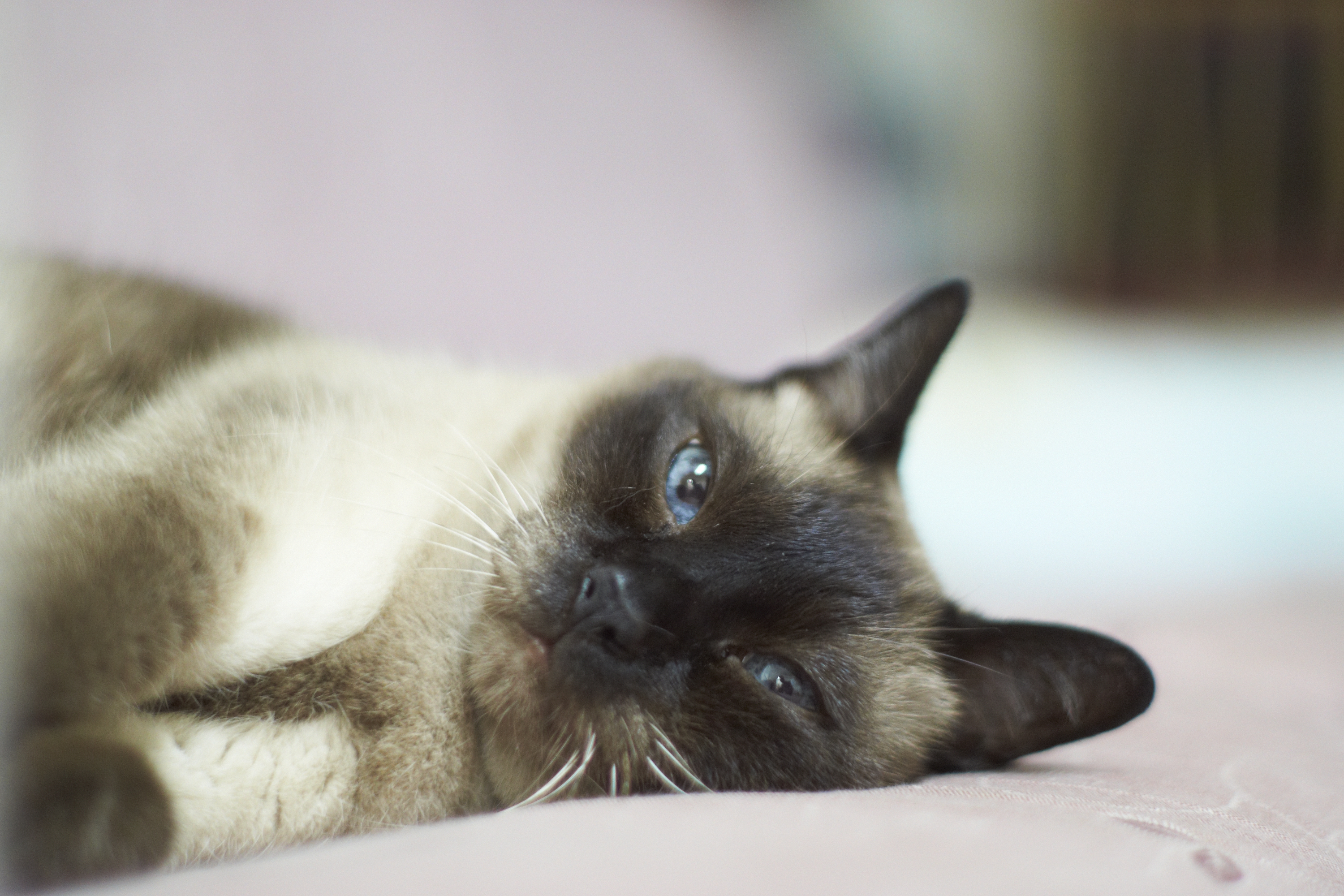 暹羅貓阿胖貓咪